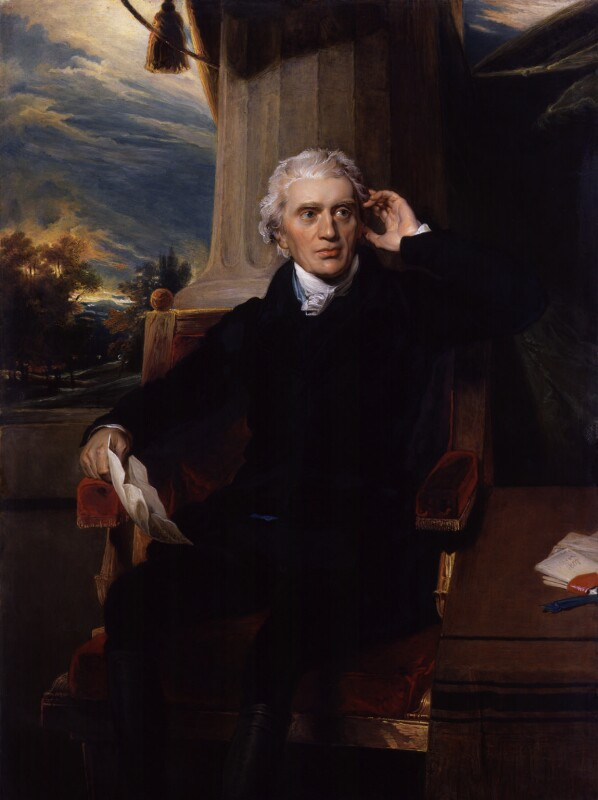 Sir Francis Baring, 1st Bt